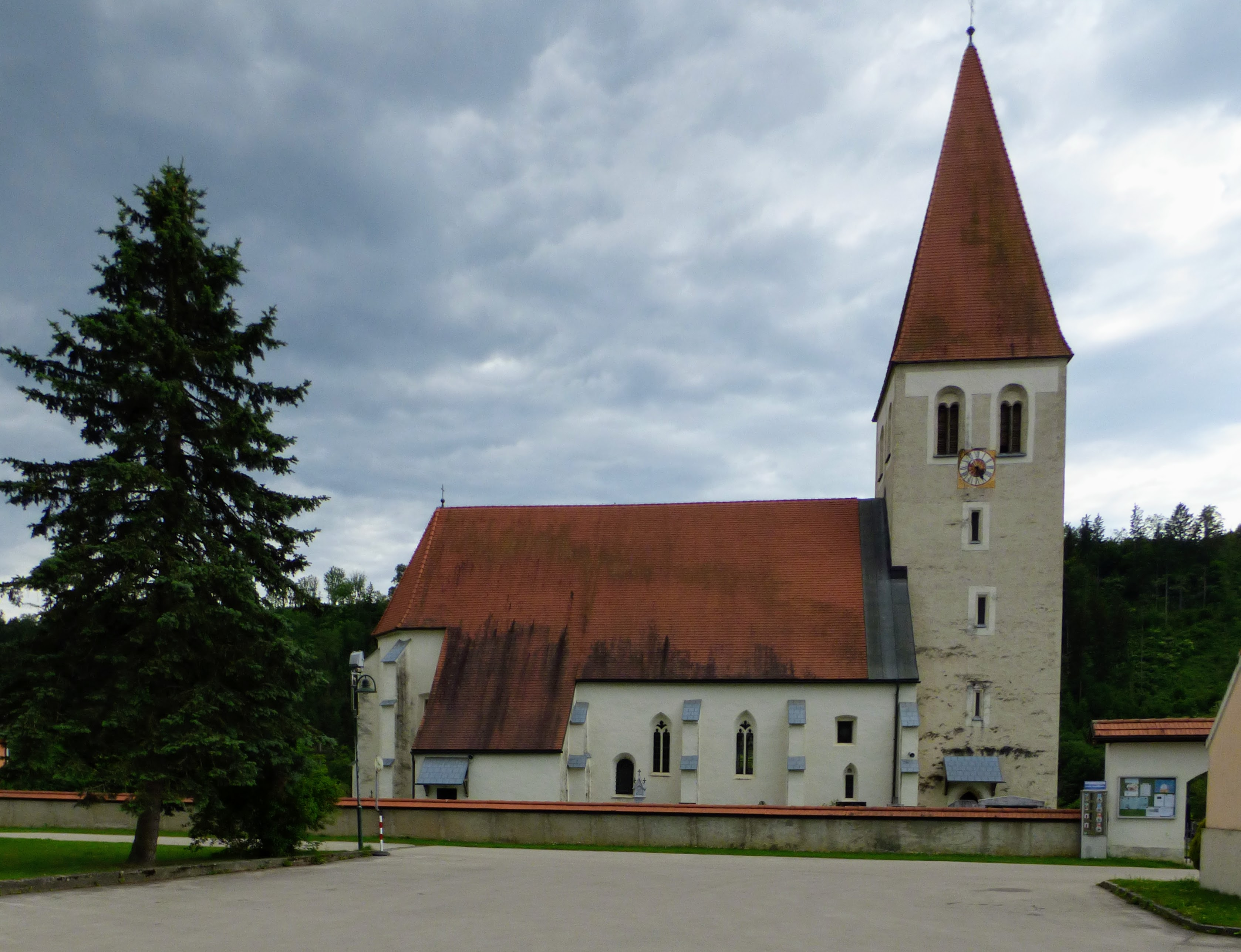 Pfarrkirche Lavamünd, Kärnten Ansicht von Norden